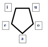 En este pentágono vocálico aparecen las vocales y su apertura, comenzando por la "a" que es la más abierta y terminando por la "i" y la "u" que son las más cerradas. Entre ellas se encuentran la "e" y la "o" que son intermedias.